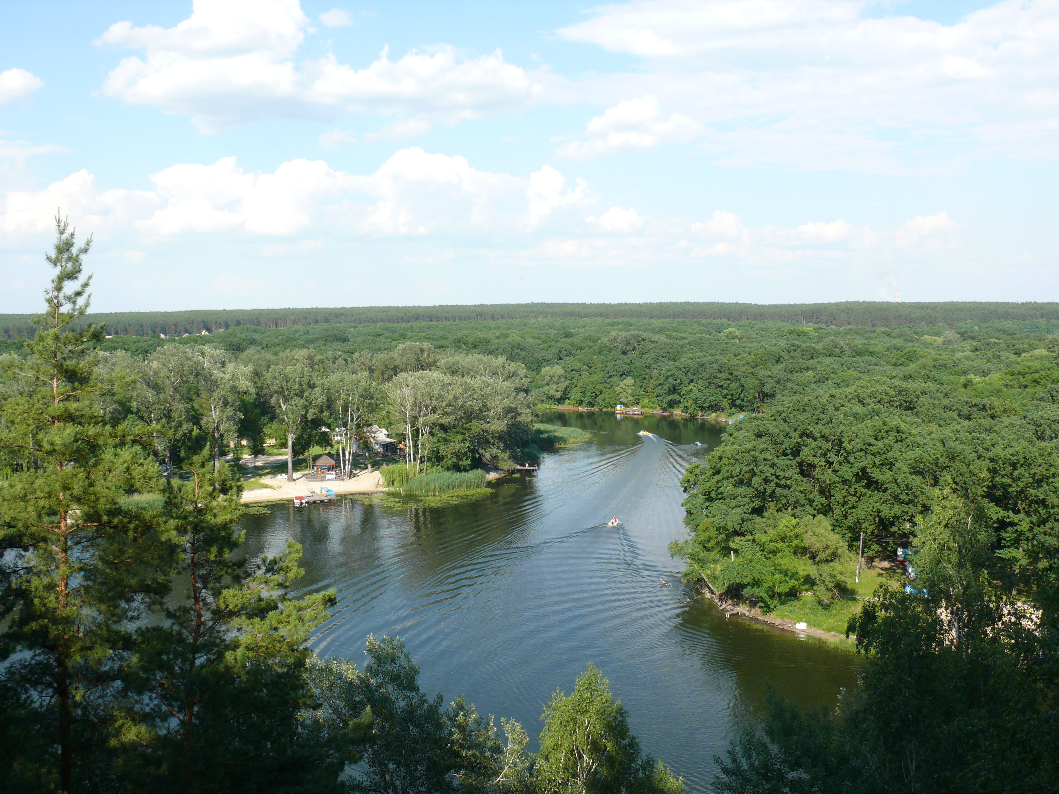 Вид на Северский Донец с Казачьей горы в Харьковской области близь Змиева